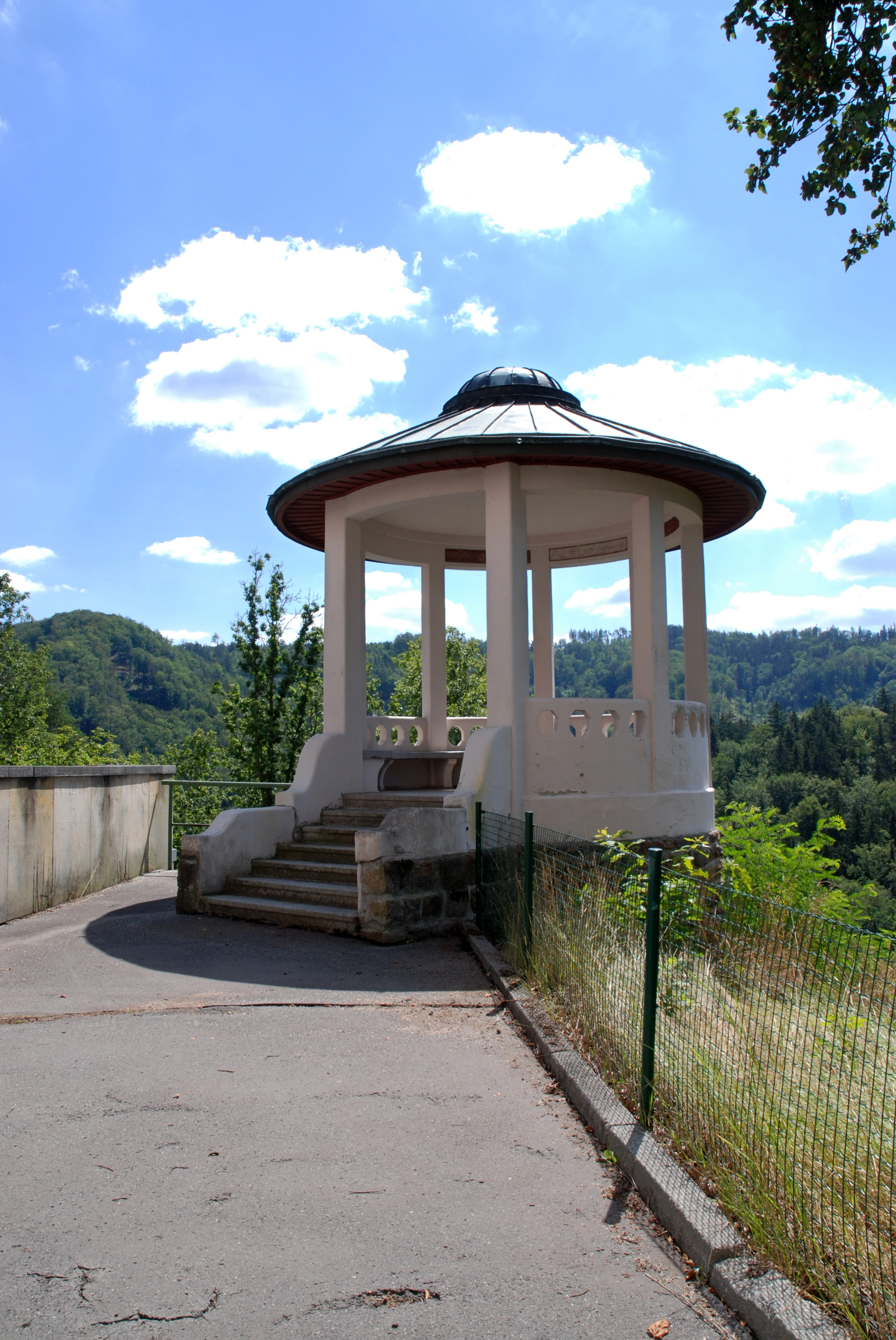 Vyhlídkový altán "Vídeňské sedátko" v Karlových Varech u hotelu Imperial